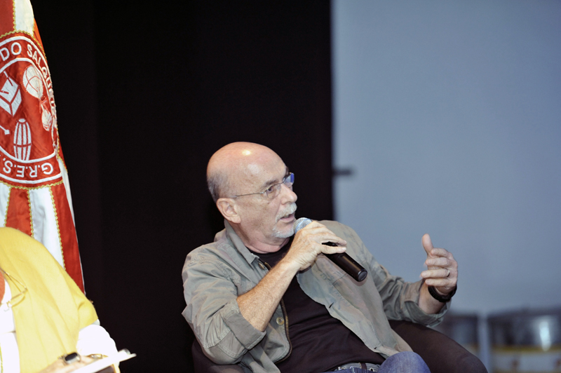 Seminário sobre o Salgueiro na FINEP 2010. Foto: Ricardo Almeida.